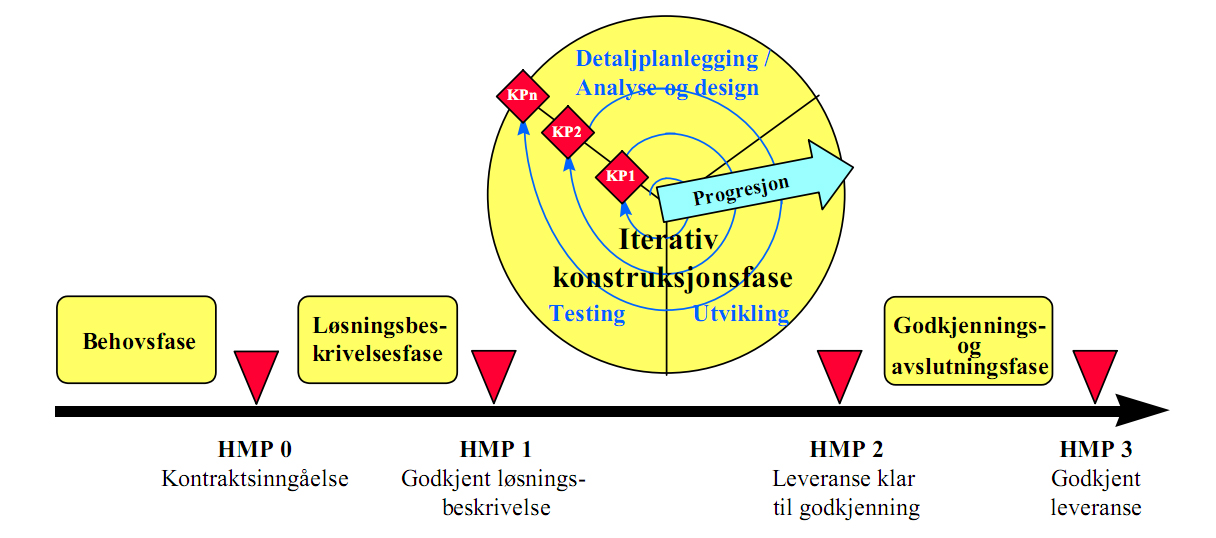 PS2000-gjennomføringsmodell